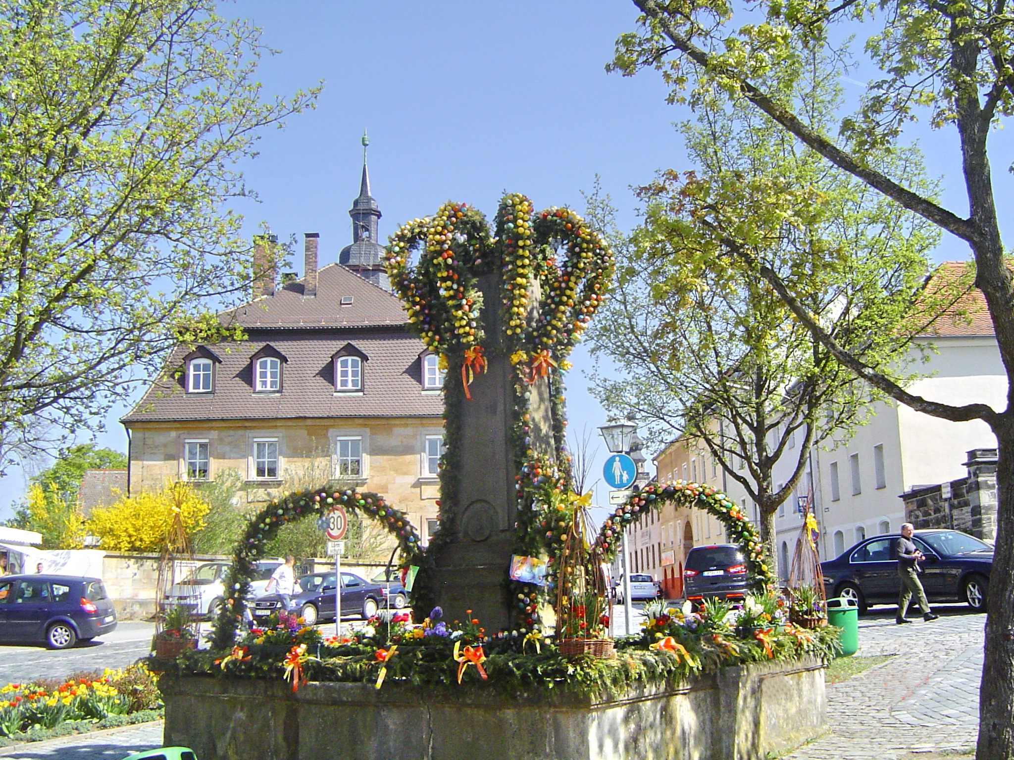 Bayreuth, Obeliskenbrunnen, Brandenburgerstrasse